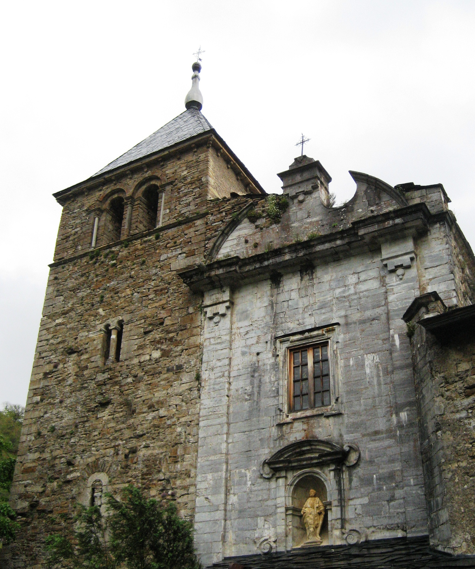 Portada de la Iglesia del Monasterio de San Pedro de Montes